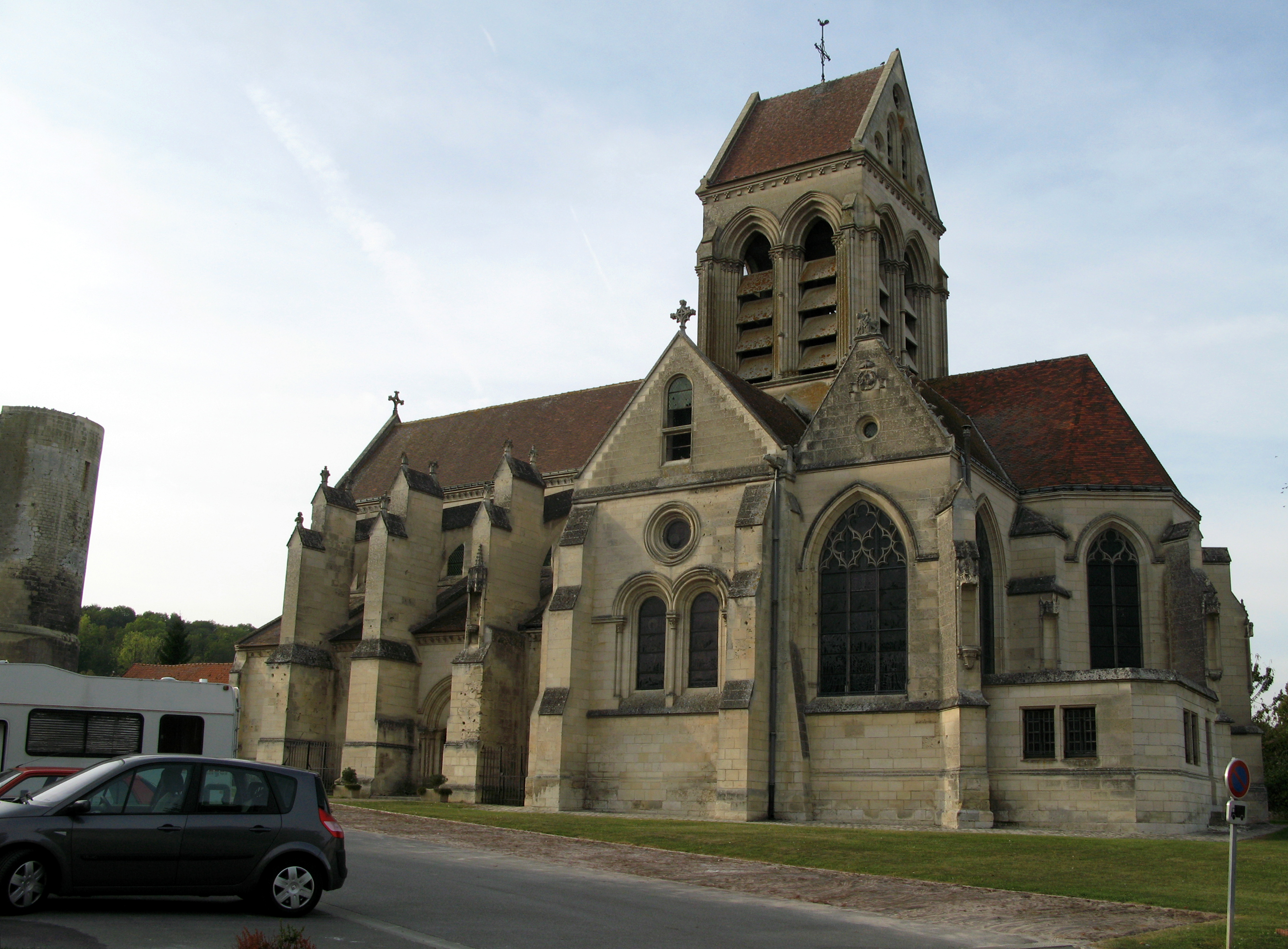 Ambleny (Aisne, France) - L'église Saint-Martin, dont le portail donne sur le donjon. . .